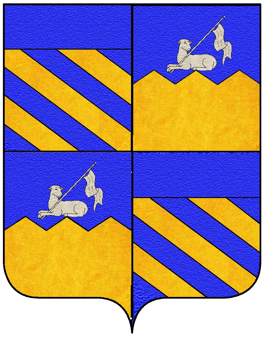 Stemma della famiglia Gozze de Trebinje et de Popovo (Gučetić, Repubblica di Ragusa-Dubrovnik)